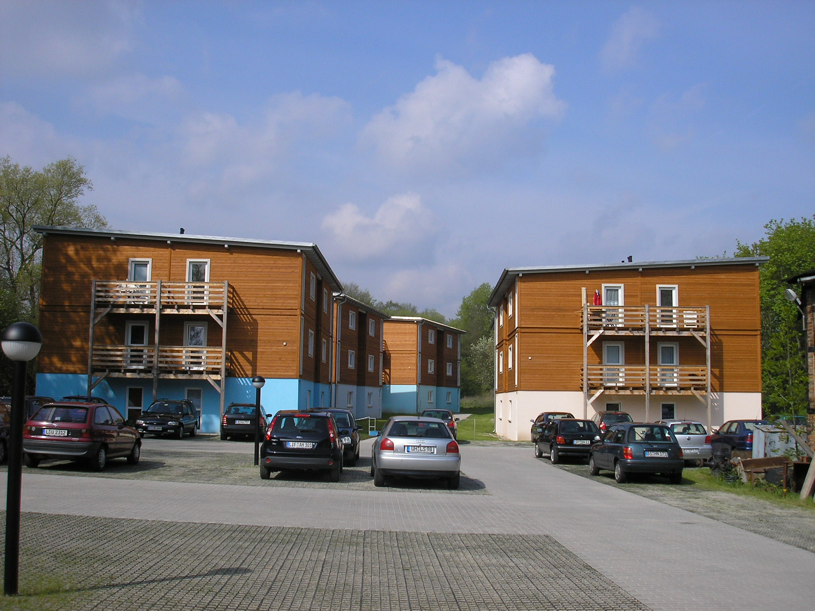 Moderne Engergiesparhäuser am Grenzhammer in Ilmenau (Thüringen).